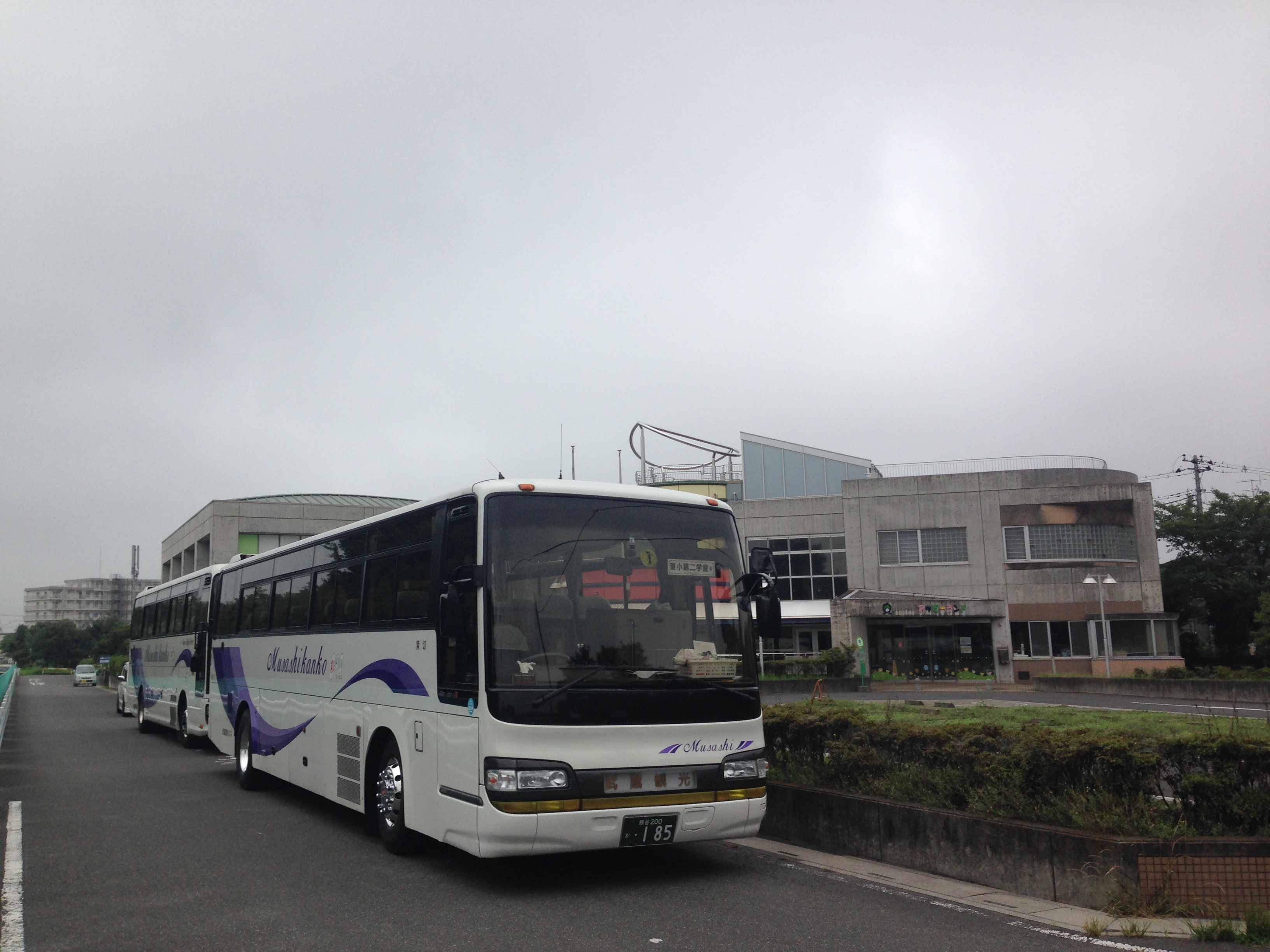 武蔵観光の大型観光バス